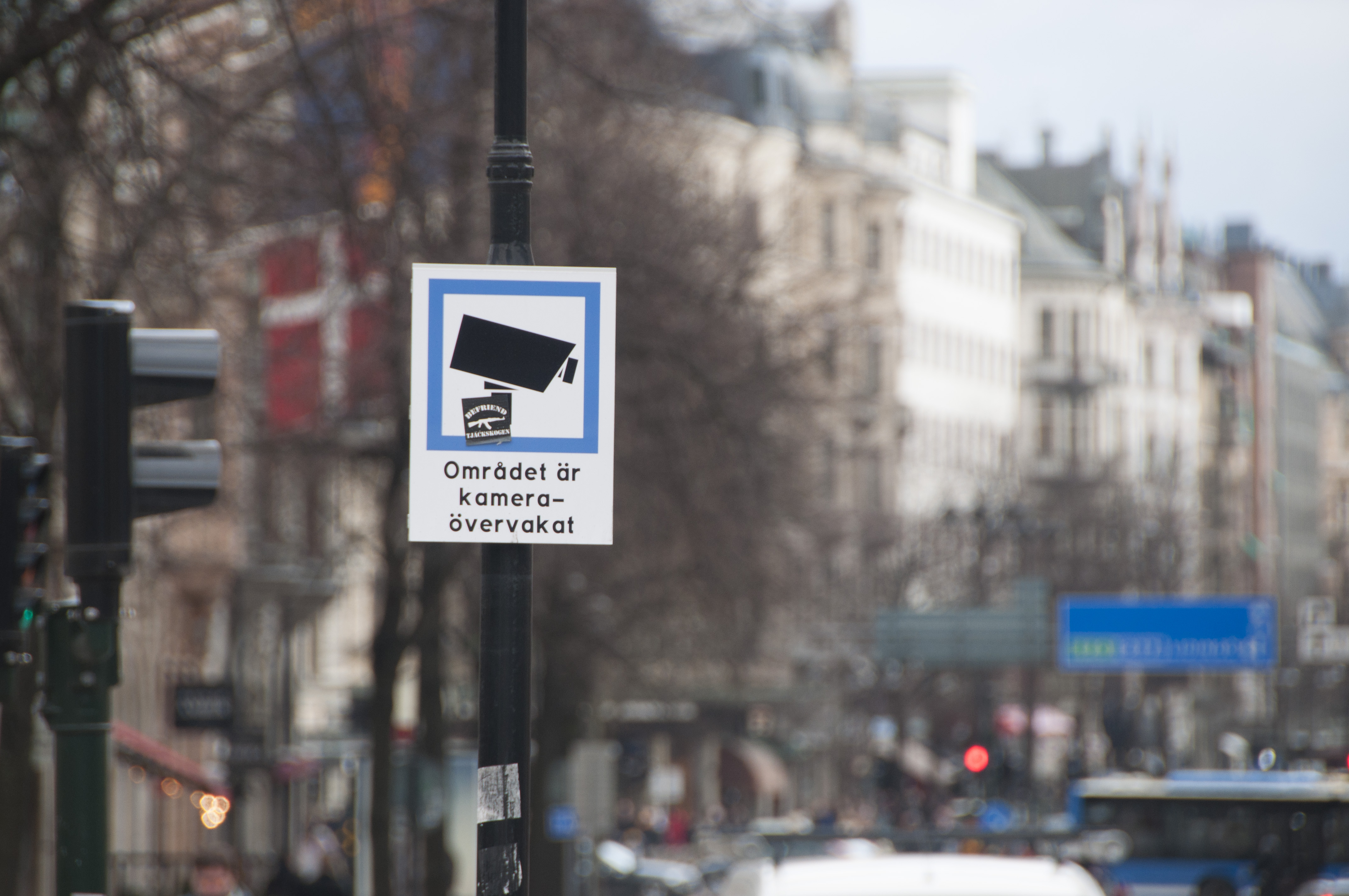 Kameraövervakning vid Stureplan. "Området är kameraövervakat"